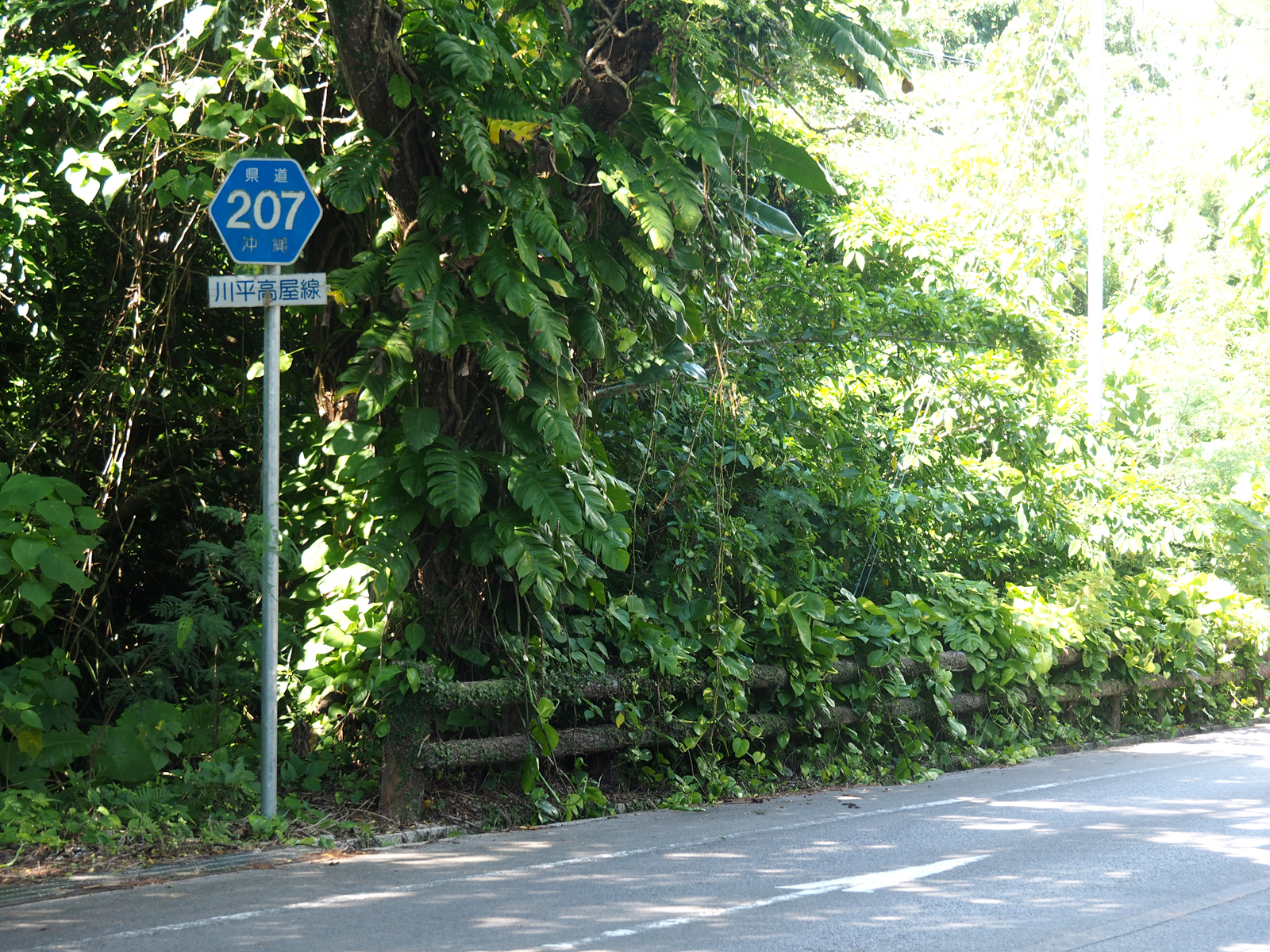 沖縄県道207号（沖縄県石垣市石垣島）